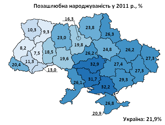 Позашлюбна народжуваність за регіонами України у 2011 р. / Extramarital birth rate in Ukraine, 2011